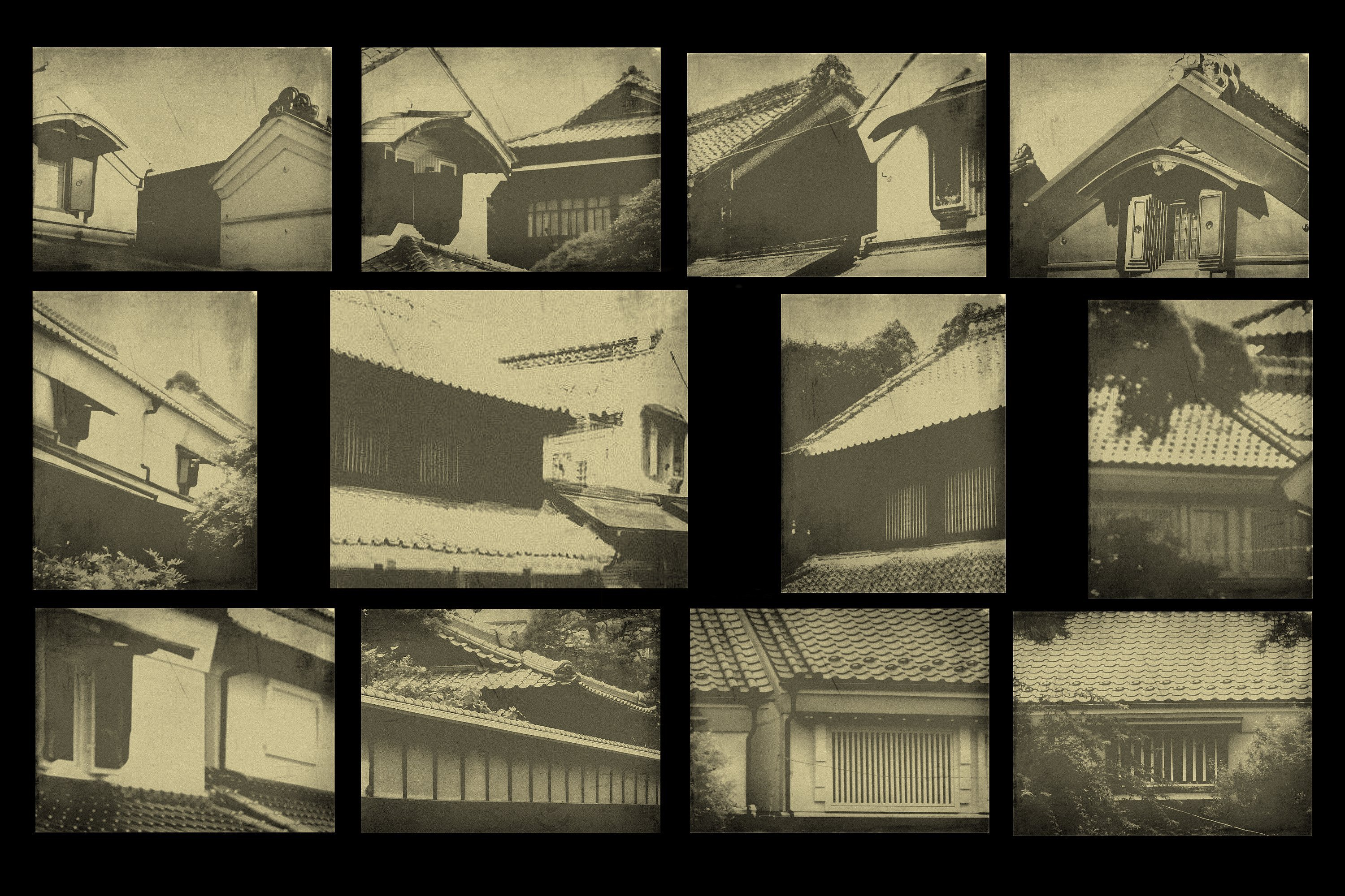 旧い「粕壁」の町なみ